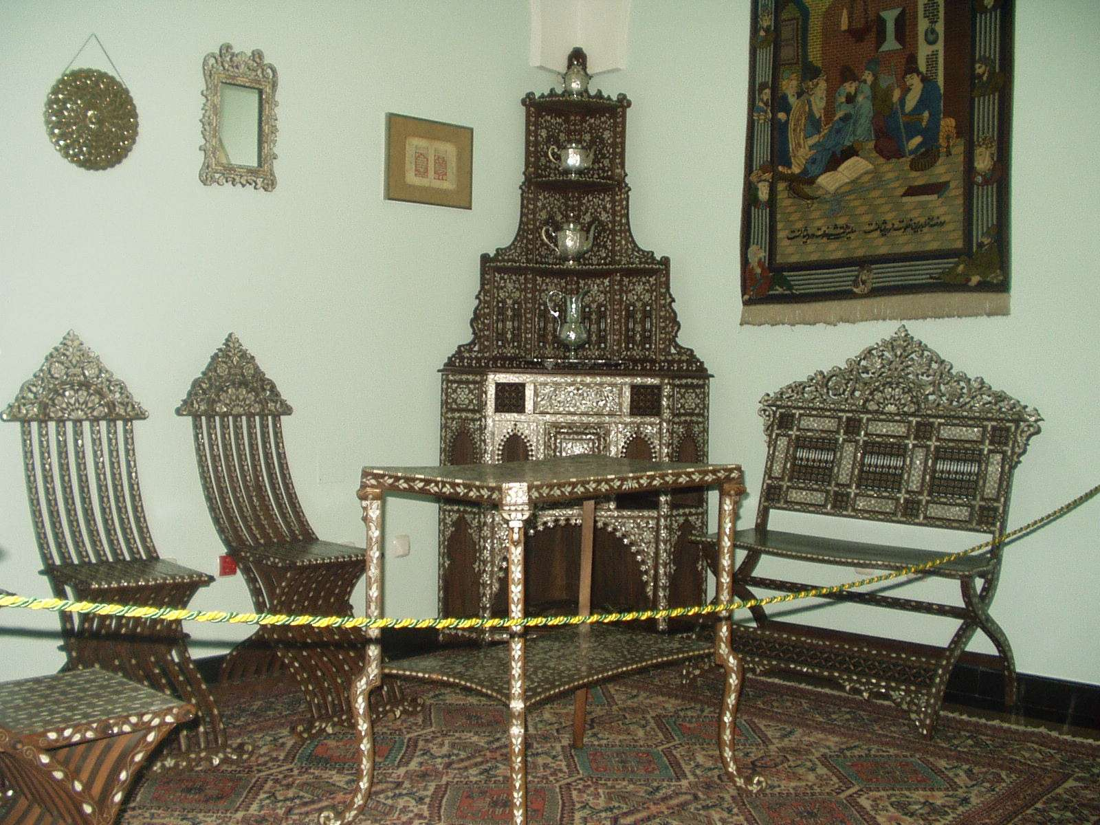 Sirijska soba 1